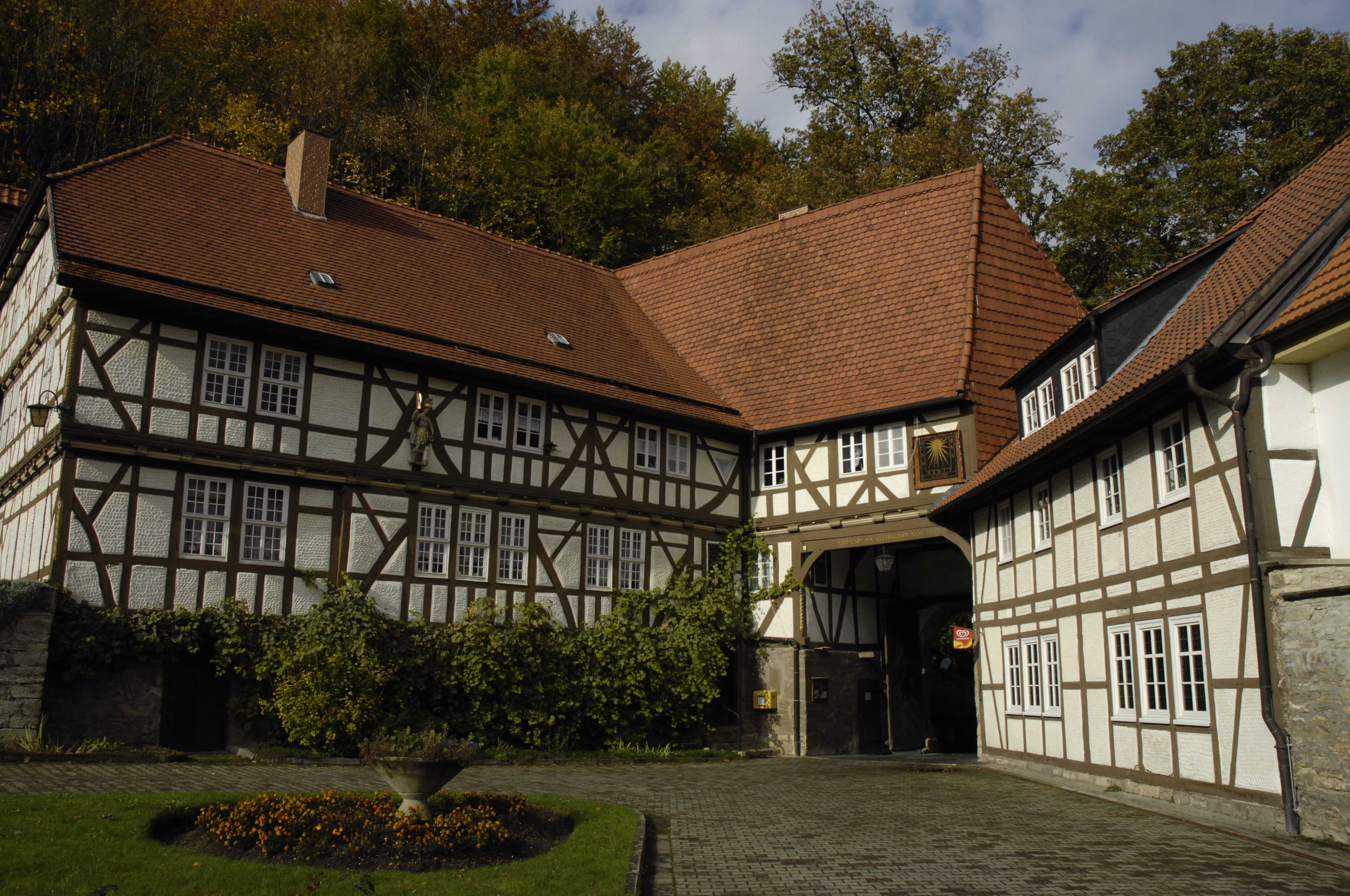 Kloster Zella, die restauerierten Gebäude beherbergen heute acuh die Klosterschänke